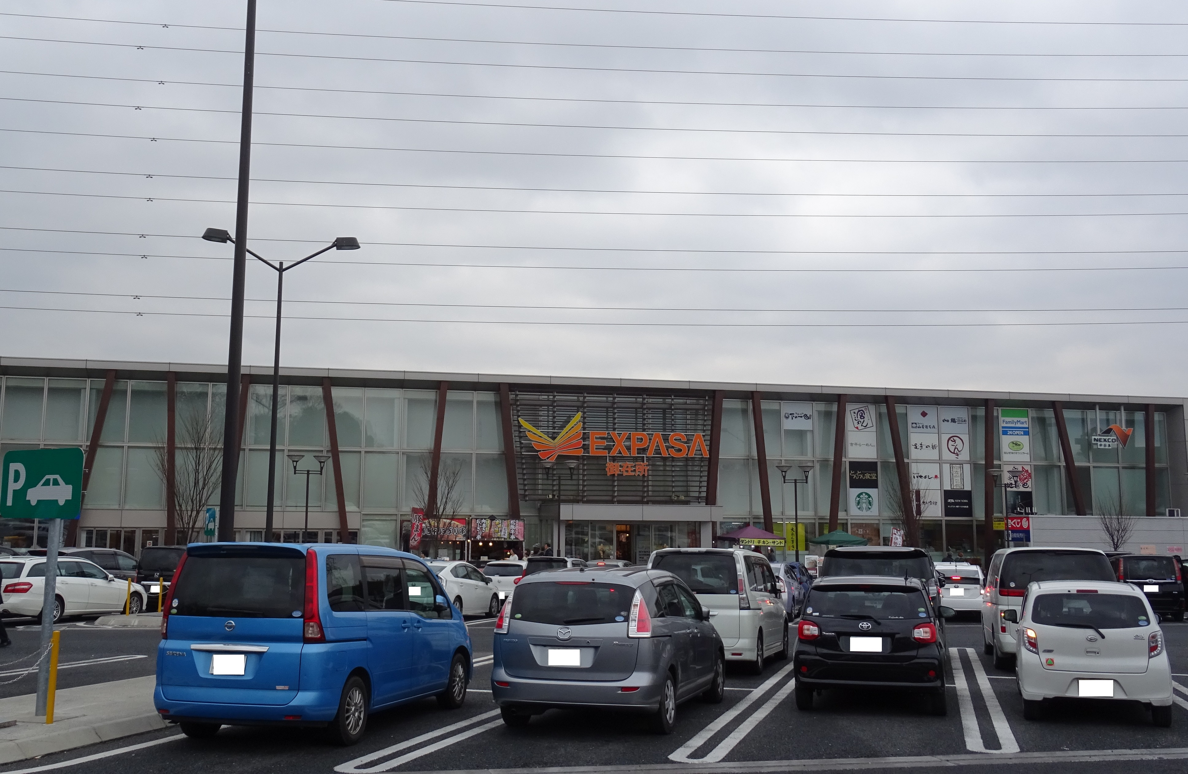 御在所